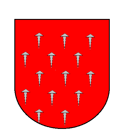 Escut municipal del terme municipal desaparegut de Toralla i Serradell (Conca de Dalt, Pallars Jussà)